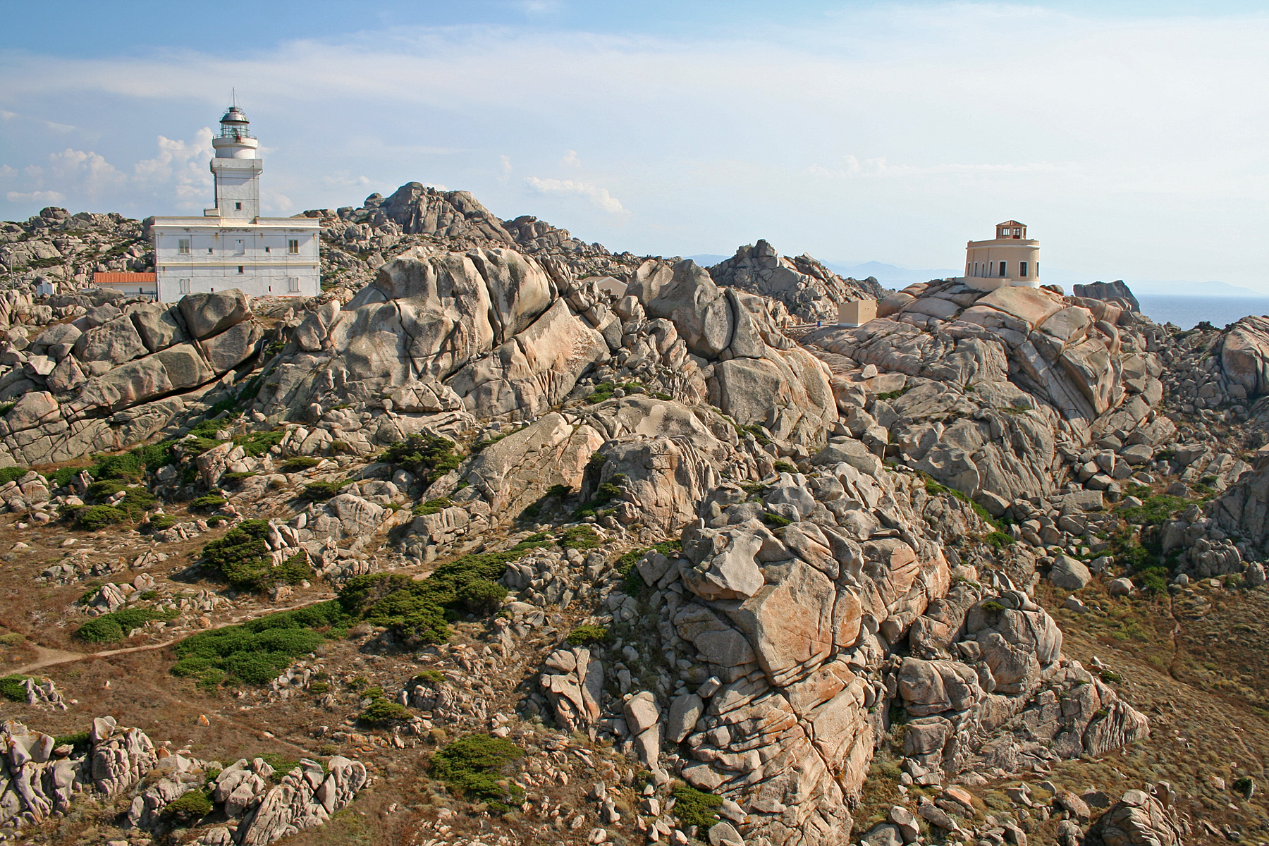 Capo Testa è una penisola situata nel nord della Sardegna, a pochi chilometri da Santa Teresa di Gallura. Si affaccia sulle Bocche di Bonifacio ed è collegata alla terraferma da uno stretto istmo, lungo il quale si estendono due spiagge. Il promontorio è costituito da rocce granitiche erose dal vento. Capo Testa era utilizzata al tempo dei romani sia per la posizione strategica sia per approvvigionarsi del granito presente che veniva stratto e trasportato a Roma. Le colonne del Pantheon, sono costruite con il granito di Capo Testa. Dagli inizi degli anni '70 Capo Testa ha iniziato il suo sviluppo turistico ed è considerata una dei siti più apprezzati della Gallura e dell'intera Sardegna. Sul promontorio di Capo Testa e' presente un faro di fondamentale importanza per la navigazione nel tratto di mare delle Bocche di Bonifacio.